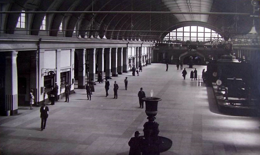 Stockholms centralstation, omkring 1930.